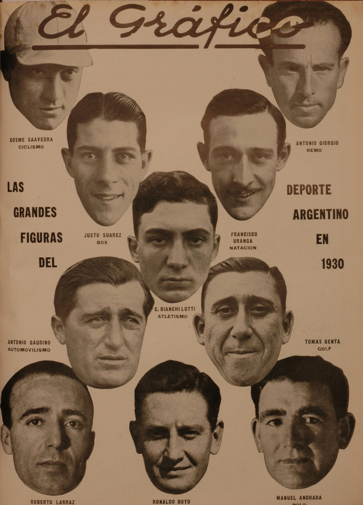 El Grafico del 03 de Enero de 1931. Edicion 599